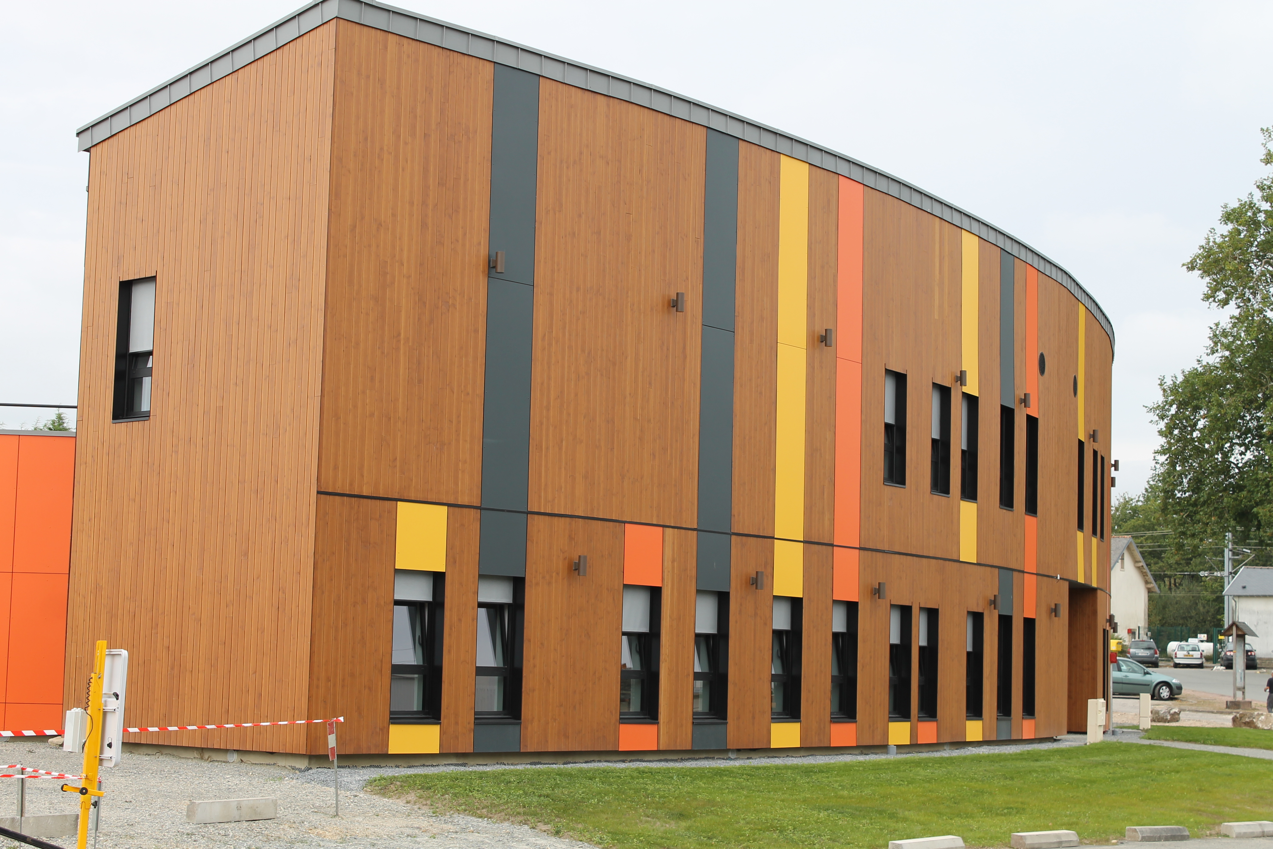 Siège de la communauté de communes du Pays de Questembert, à Questembert (56). Inauguré en septembre 2014.